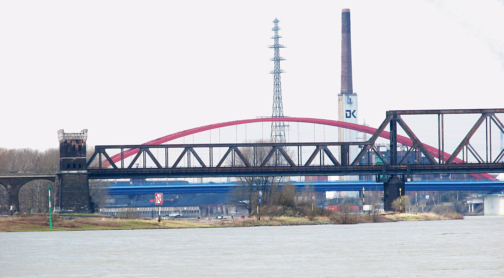 Hochfelder Eisenbahnbrücke über den Rhein in Duisburg